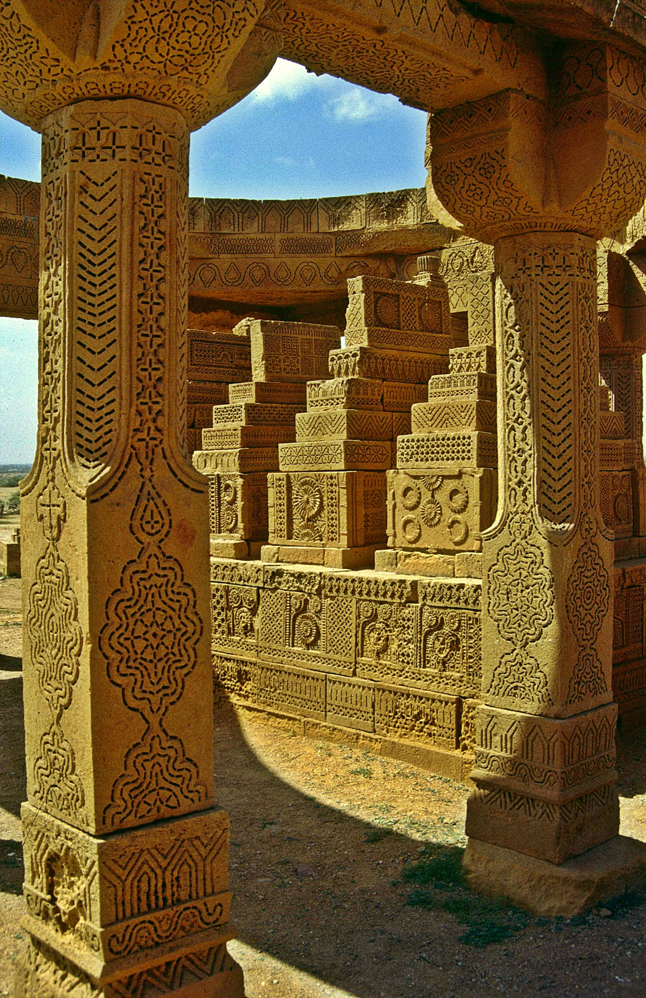 Chaukhandi-Grab/Südost-Pakistan